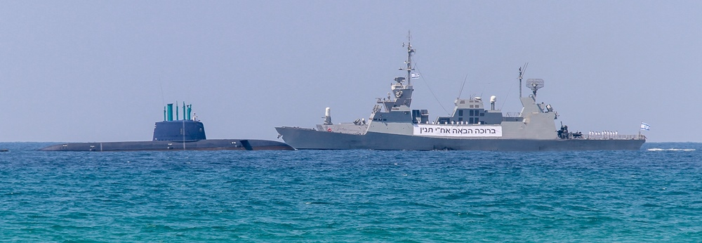 שייטת ספינות הטילים מקבלת את פני הצוללת אח"י תנין